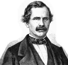 La disputa con el poder de Barrios con Dueñas, llevo que un tribunal militar ordenara su ejecución Bajo su liderazgo, "el partido clerical estaba en ascenso y El Salvador experimentó una reacción conservadora de gran alcance